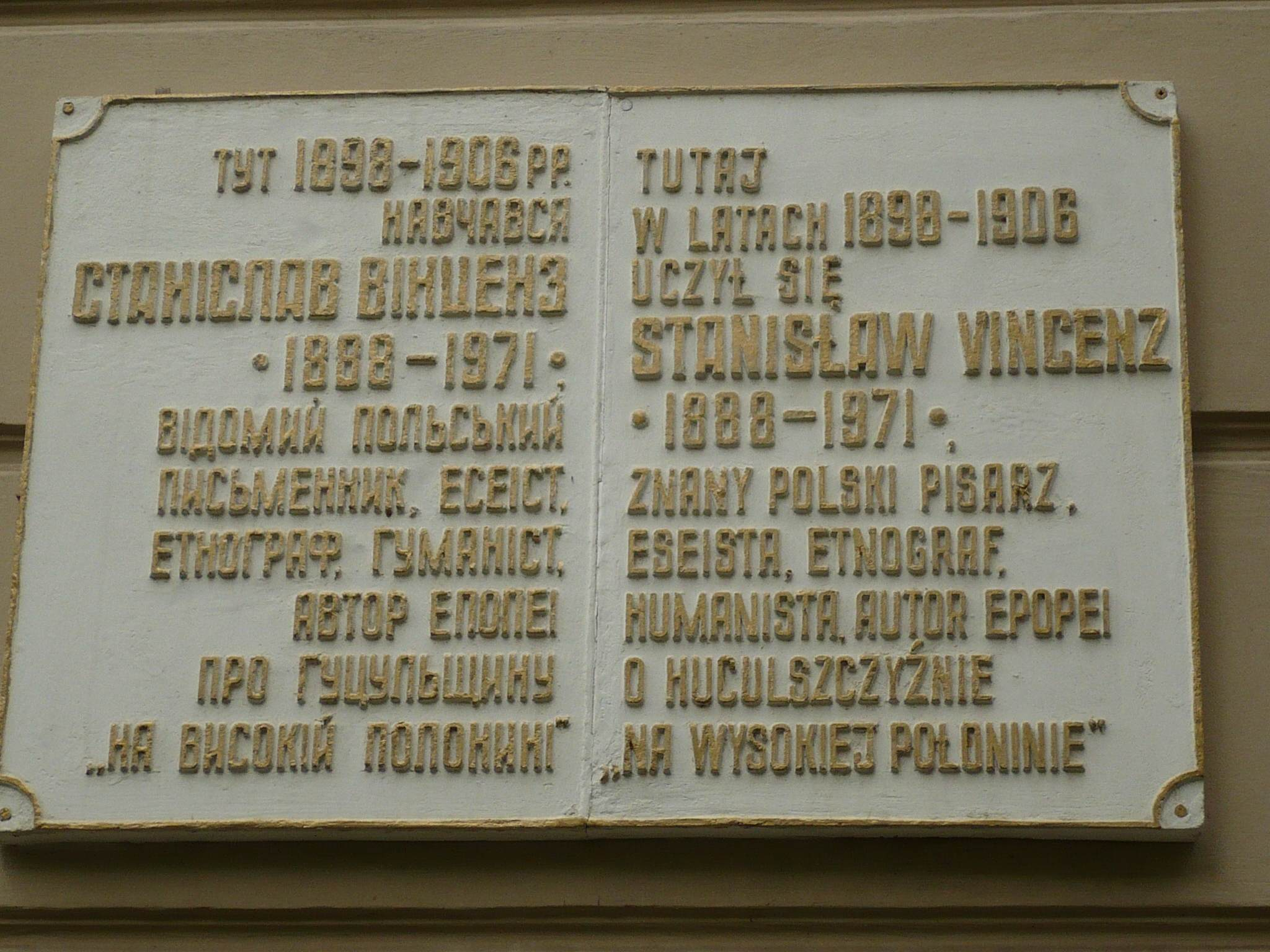 Tablica pamiątkowa St. Vincenza na ścianie dawnego Gimnazjum K. Jagiellończyka w Kołomyji, 2009 r.